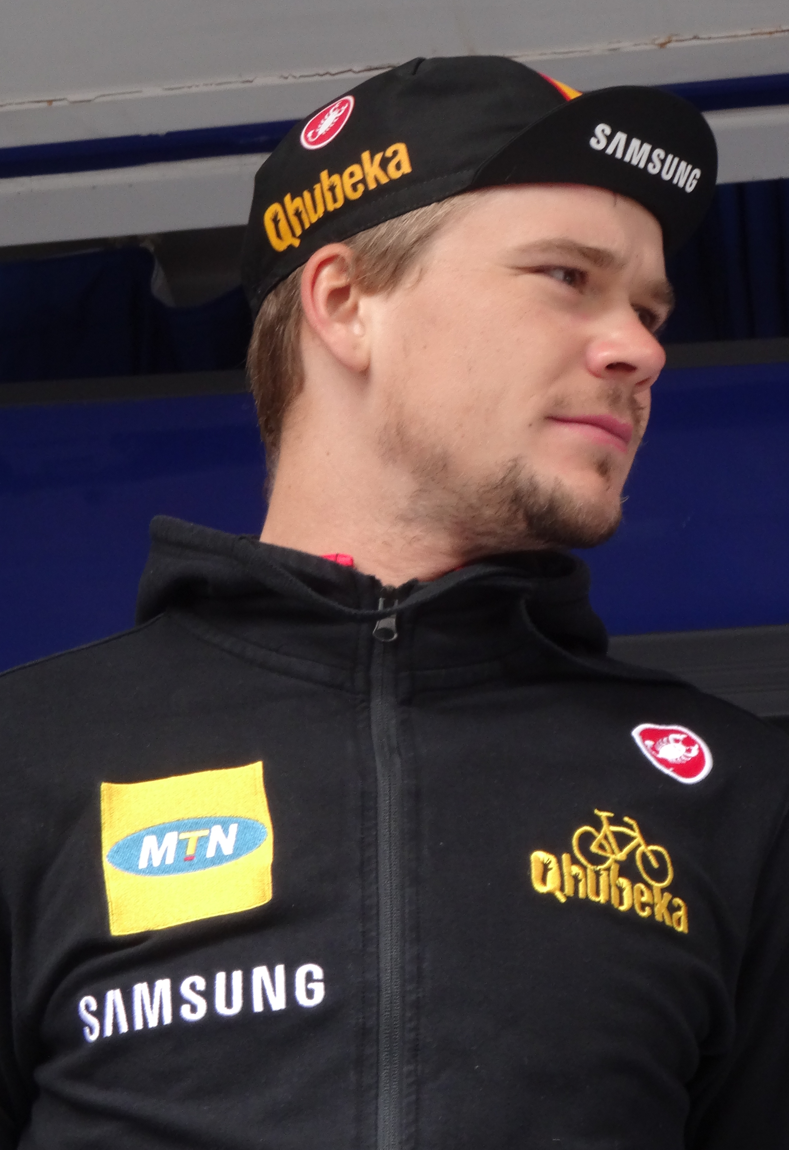 Reportage photographique réalisé le mercredi 7 mai 2014 au départ de la première étape de l'édition 2014 des Quatre jours de Dunkerque à Dunkerque, Nord, Nord-Pas-de-Calais, France. Depicted person: Martin Reimer Depicted team: MTN-Qhubeka